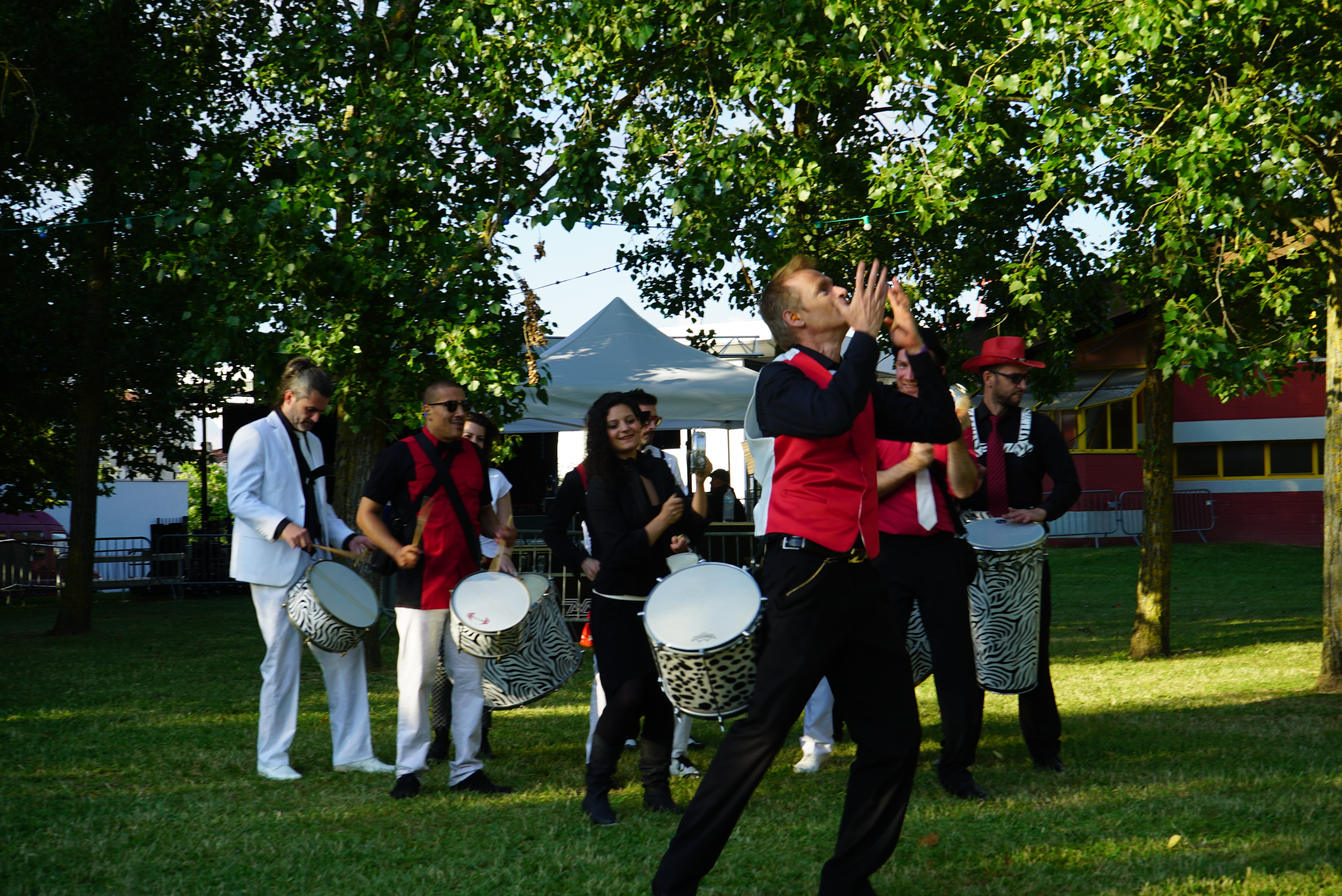 fête du 14 juillet 2016 à Tinqueux